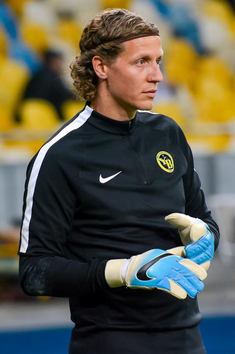 Динамо - Янг Бойз (2:2) фото с матча